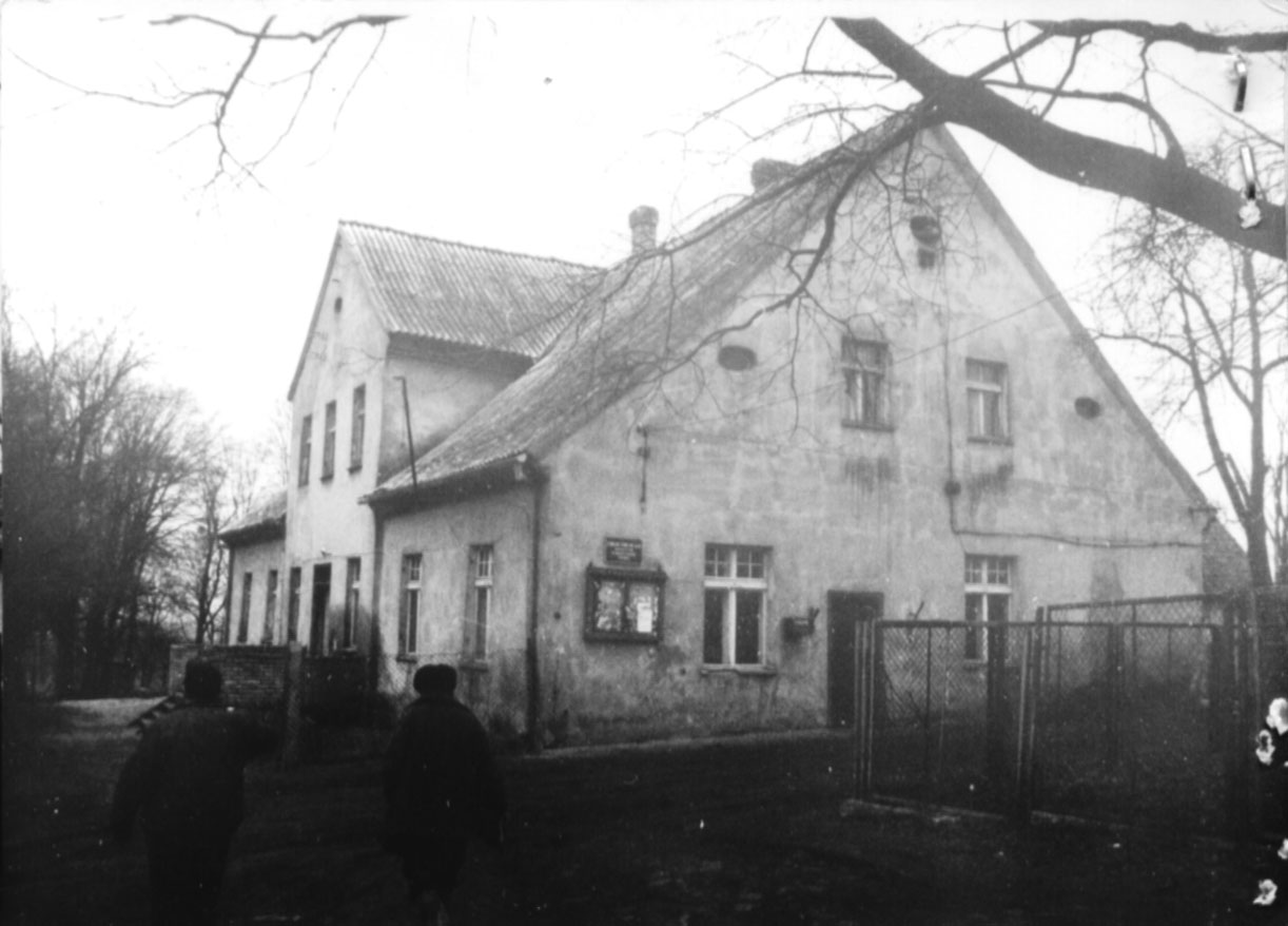 nieistniejący dwór w Wandajnach (stan na 1991 rok)